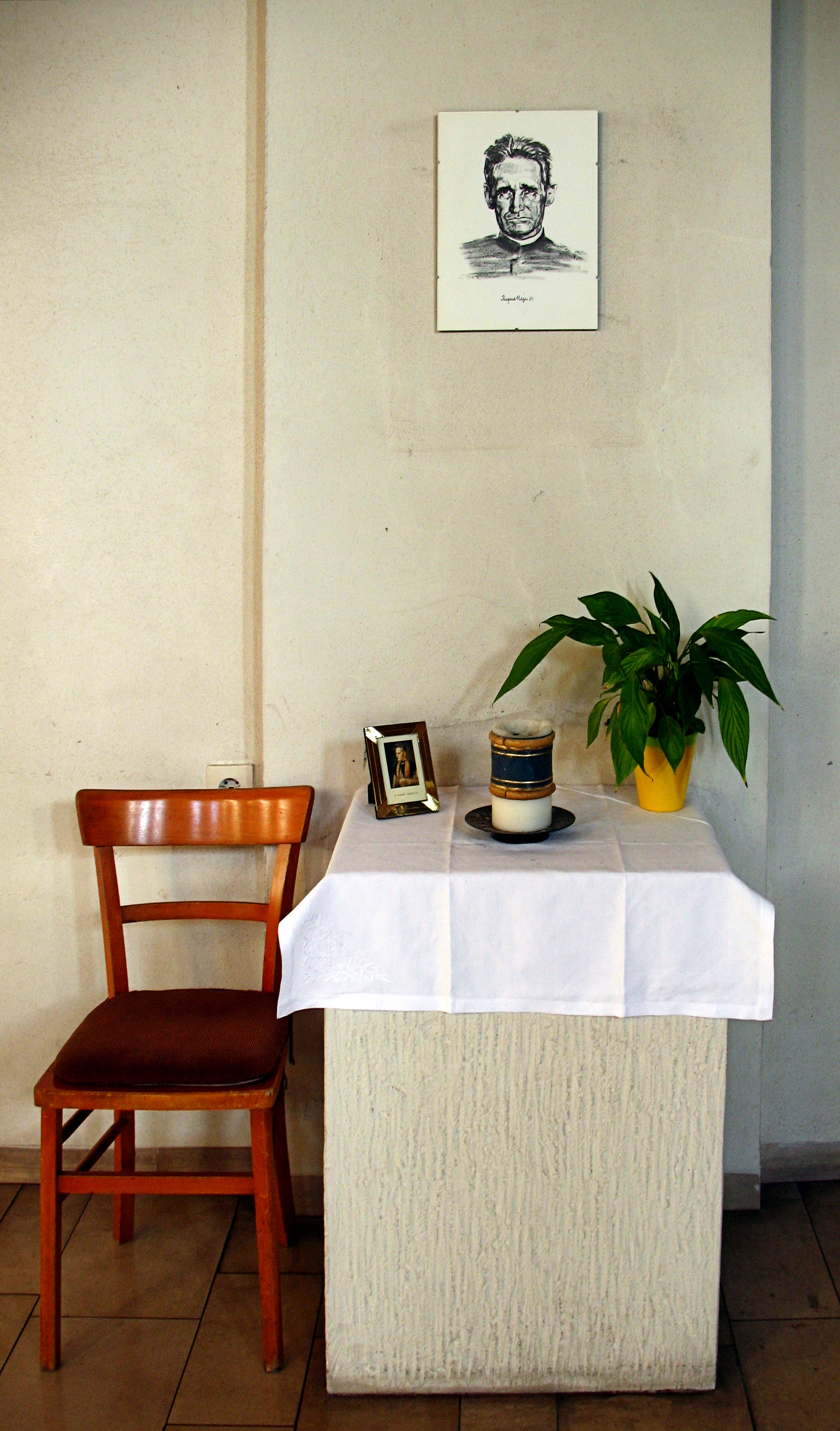 Germany, Bavaria, Munich, Pfarrer Rupert Mayer, St. Benedikt, Schrenkstraße